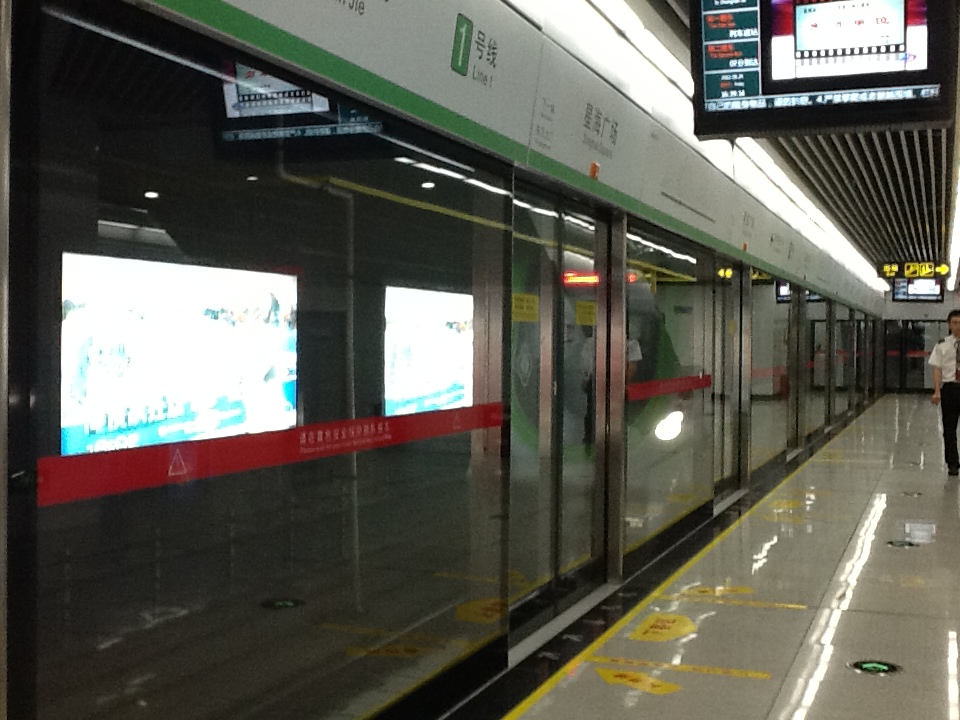 苏州轨道交通1号线列车头